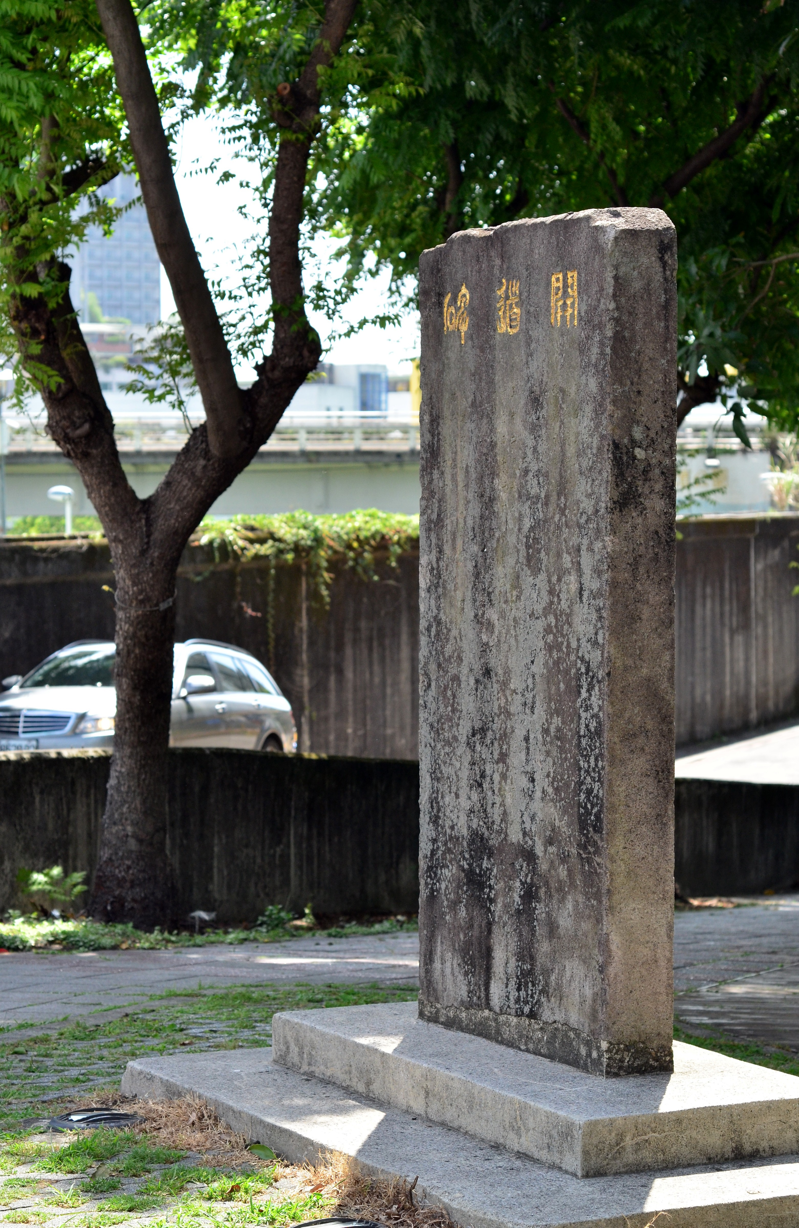 中文（台灣）: 瑠公圳的景尾開道碑。